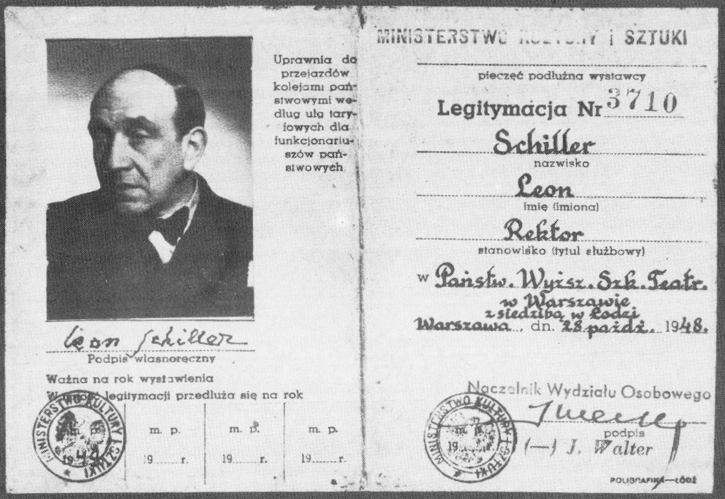 Legitymacja Leona Schillera nr 3710